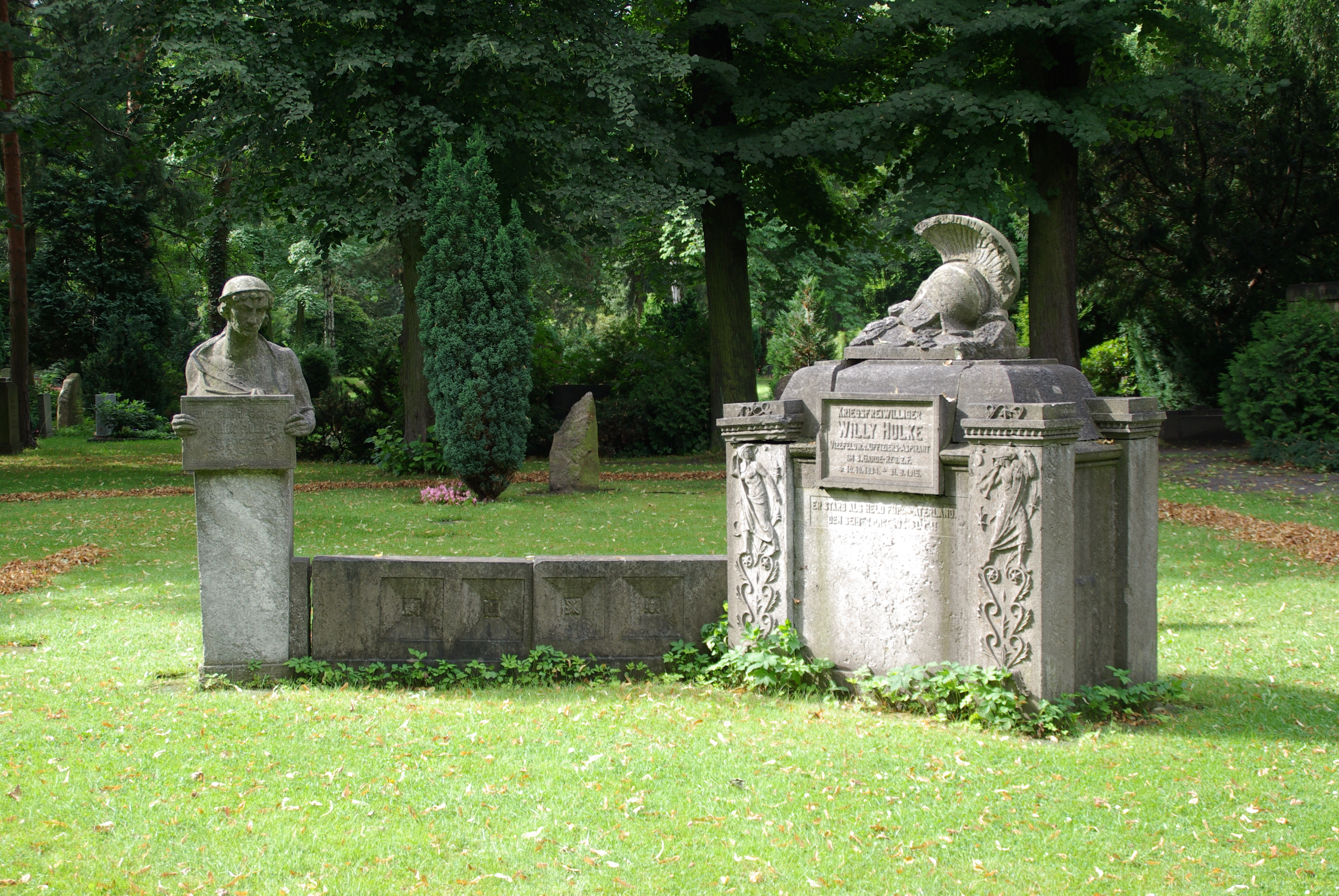 Berlin Mariendorf. Der Kirchhof an der Friedenstra0e 12/14. Das Grabmal Hulke steht unter Denkmalschutz.